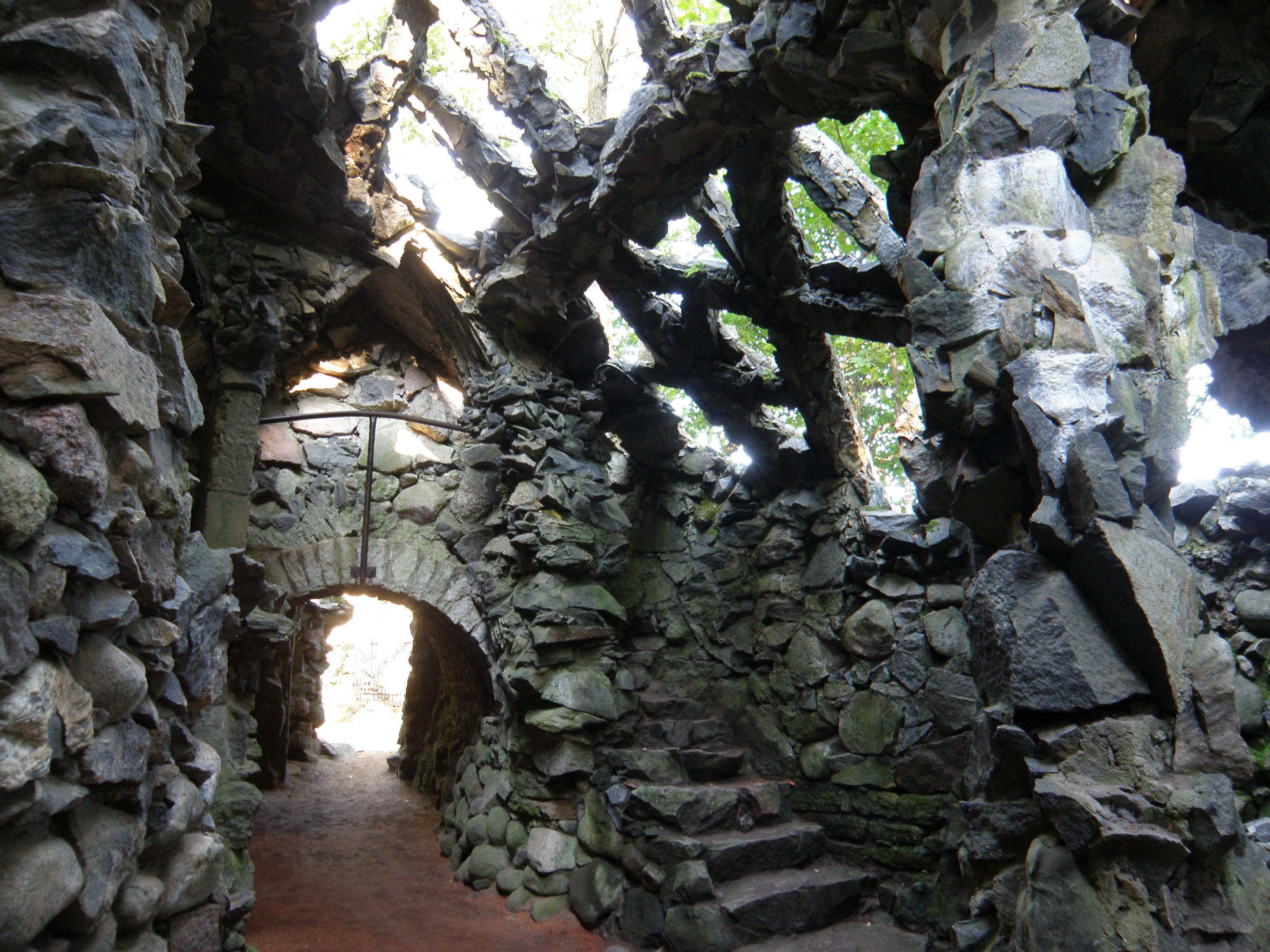 Hohenhaupti lossi palmimaja